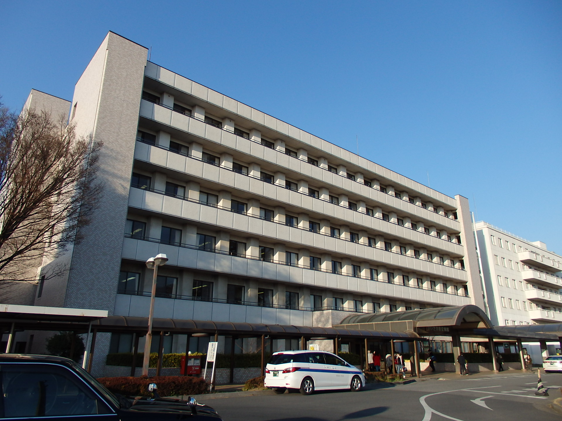 さいたま市立病院（旧浦和市立病院）